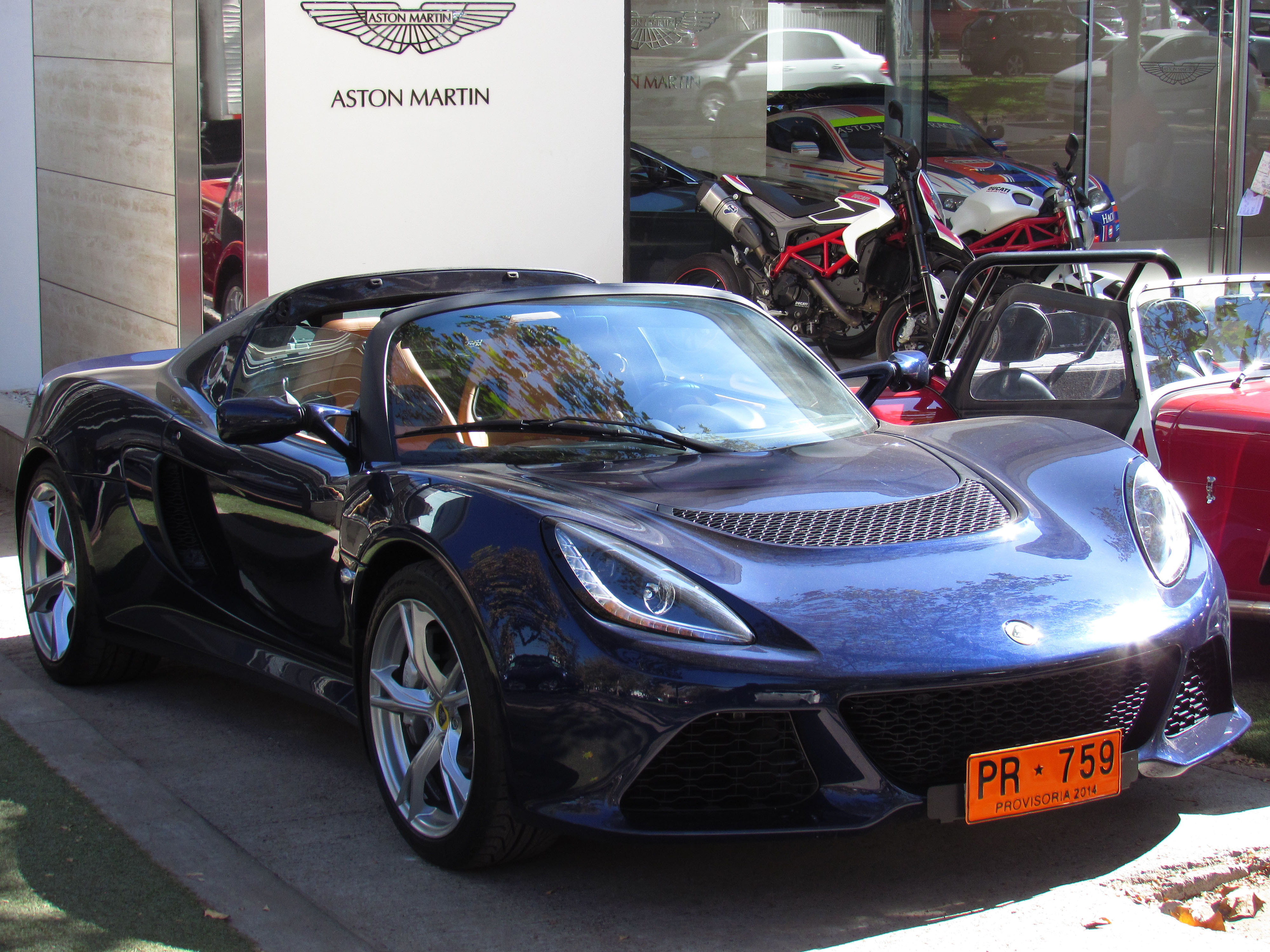 Lotus Exige S 2014